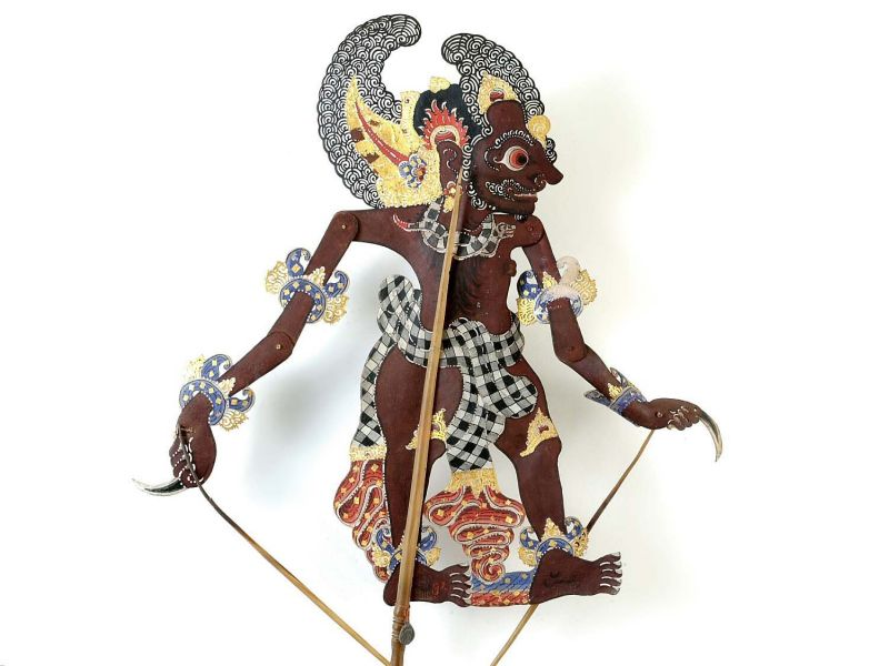 Schaduwfiguur. Wajangfiguur voorstellende Bima Unknown language: Wayang purwa